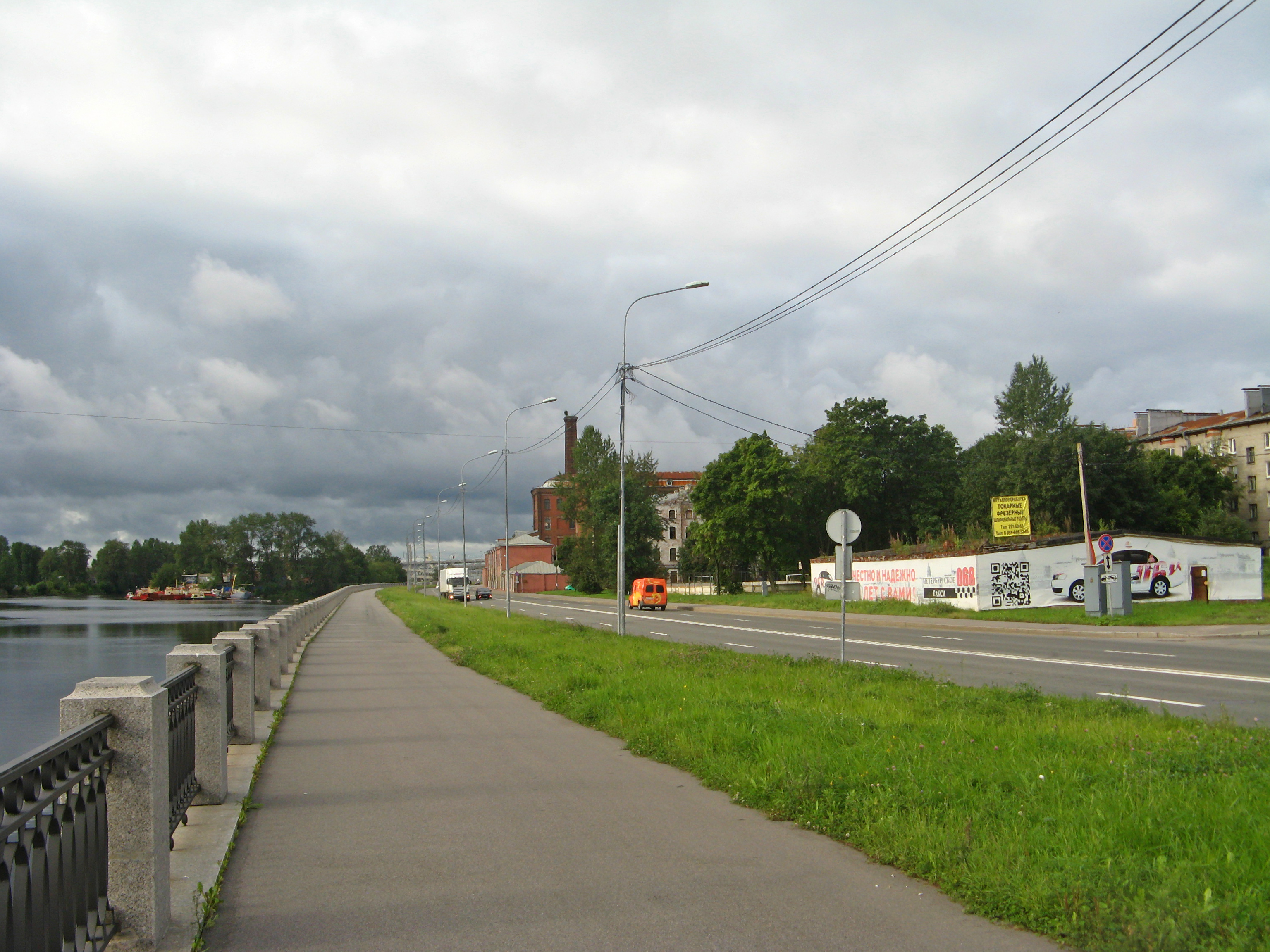 Санкт-Петербург, набережная Екатерингофки